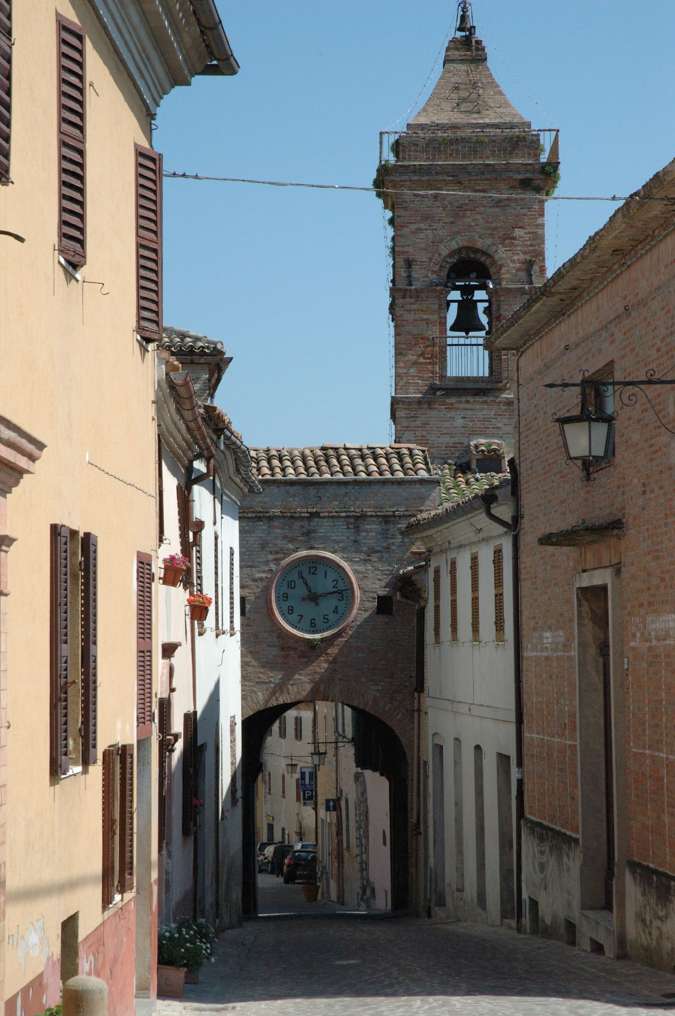 Barbara, Ancona, Marche, Italia